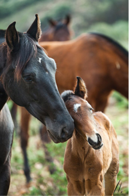 caballos-pura-raza-andaluz